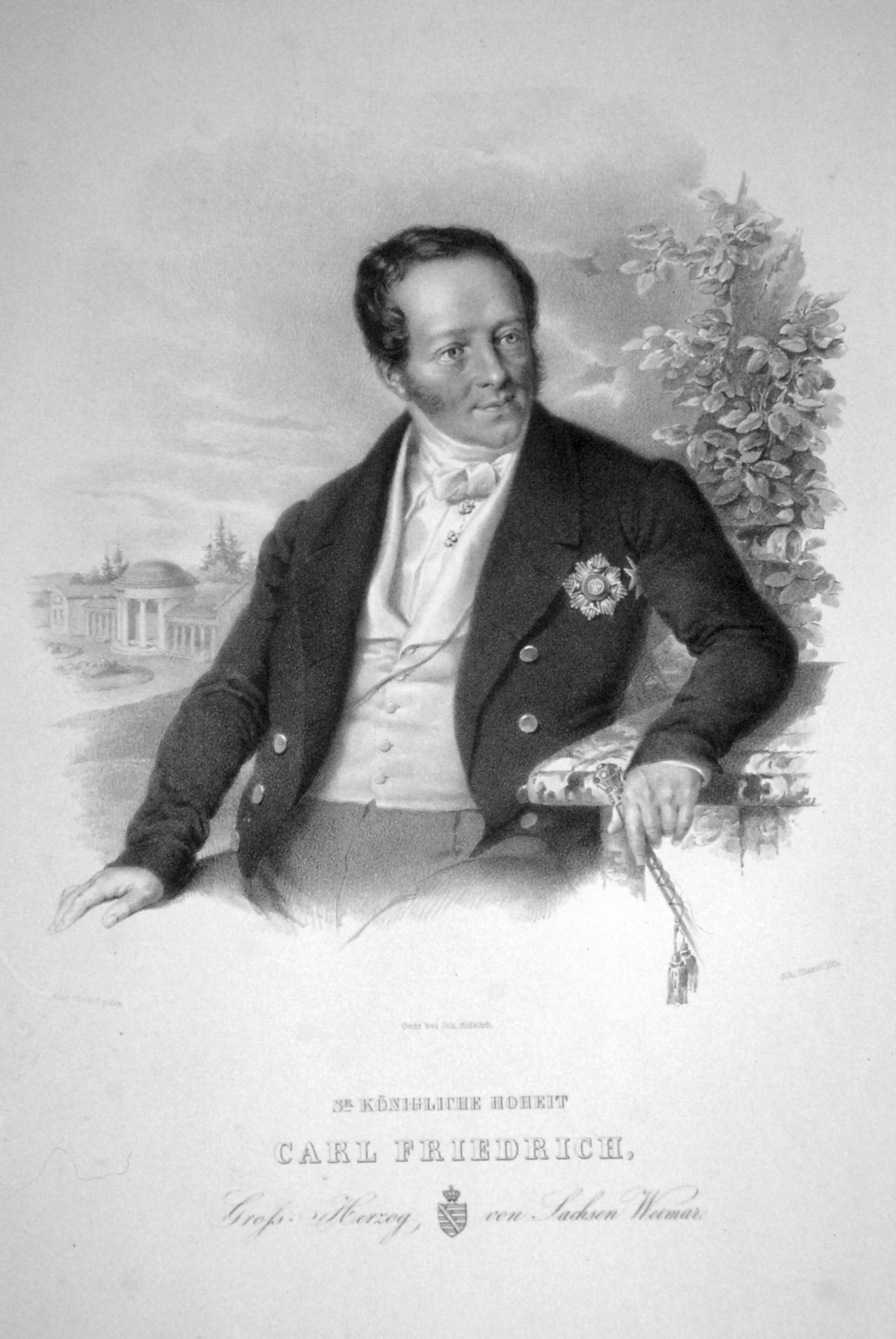 Carl Friedrich, Großherzog von Sachsen-Weimar, Lithographie von Johann Clarot nach einem Gemälde von Alexander Clarot